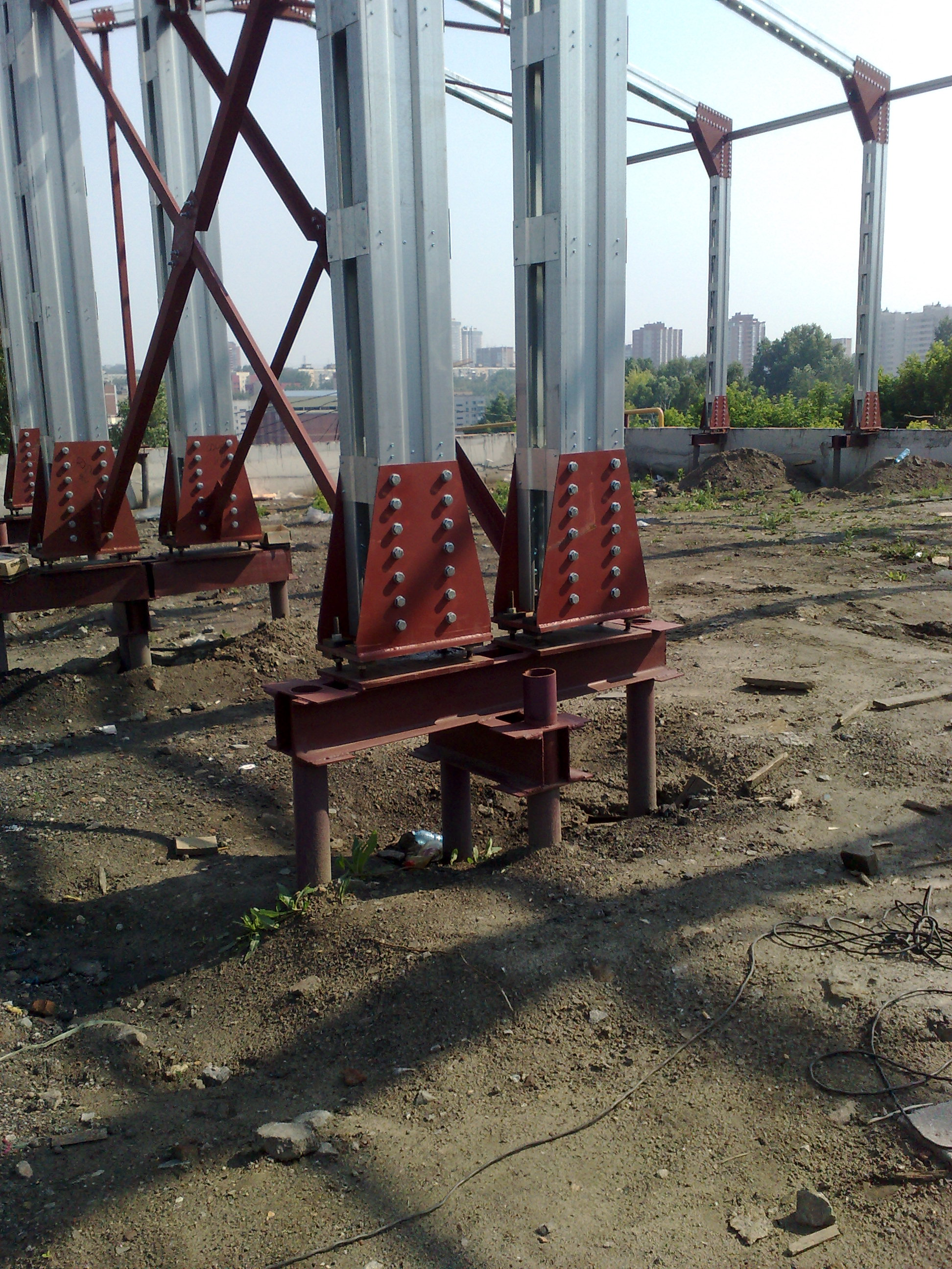 Винтовые сваи в качестве фундамента теплого склада. Г. Новосибирск.